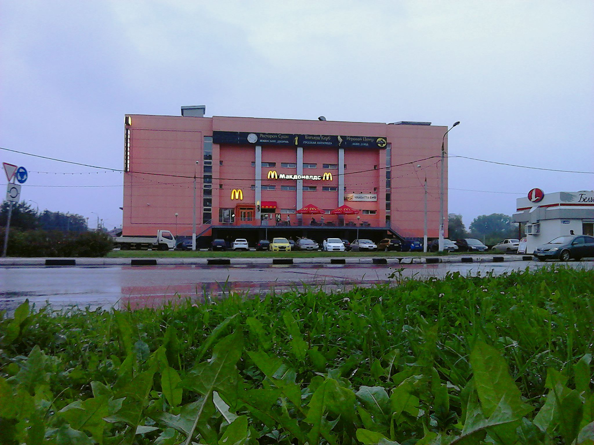 "Макдоналдс" в торце неработающего ТЦ "Аквилон" (Орехово-Зуево), август 2013